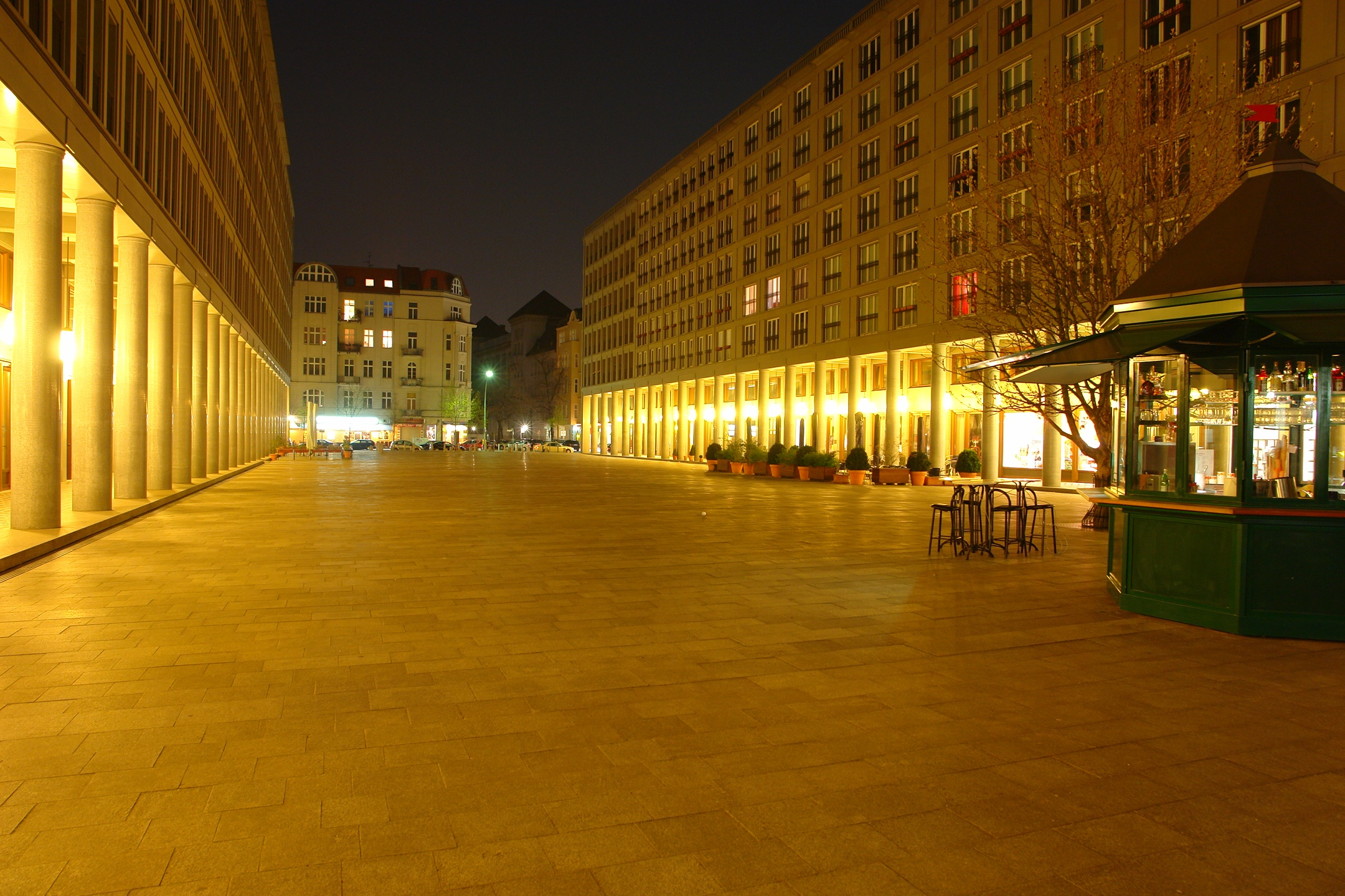 Der nächtliche Walter-Benjamin-Platz mit Leibniz-Kolonnaden an der Wielandstraße mit Blick auf die Leibnizstraße im Berliner Ortsteil Charlottenburg.